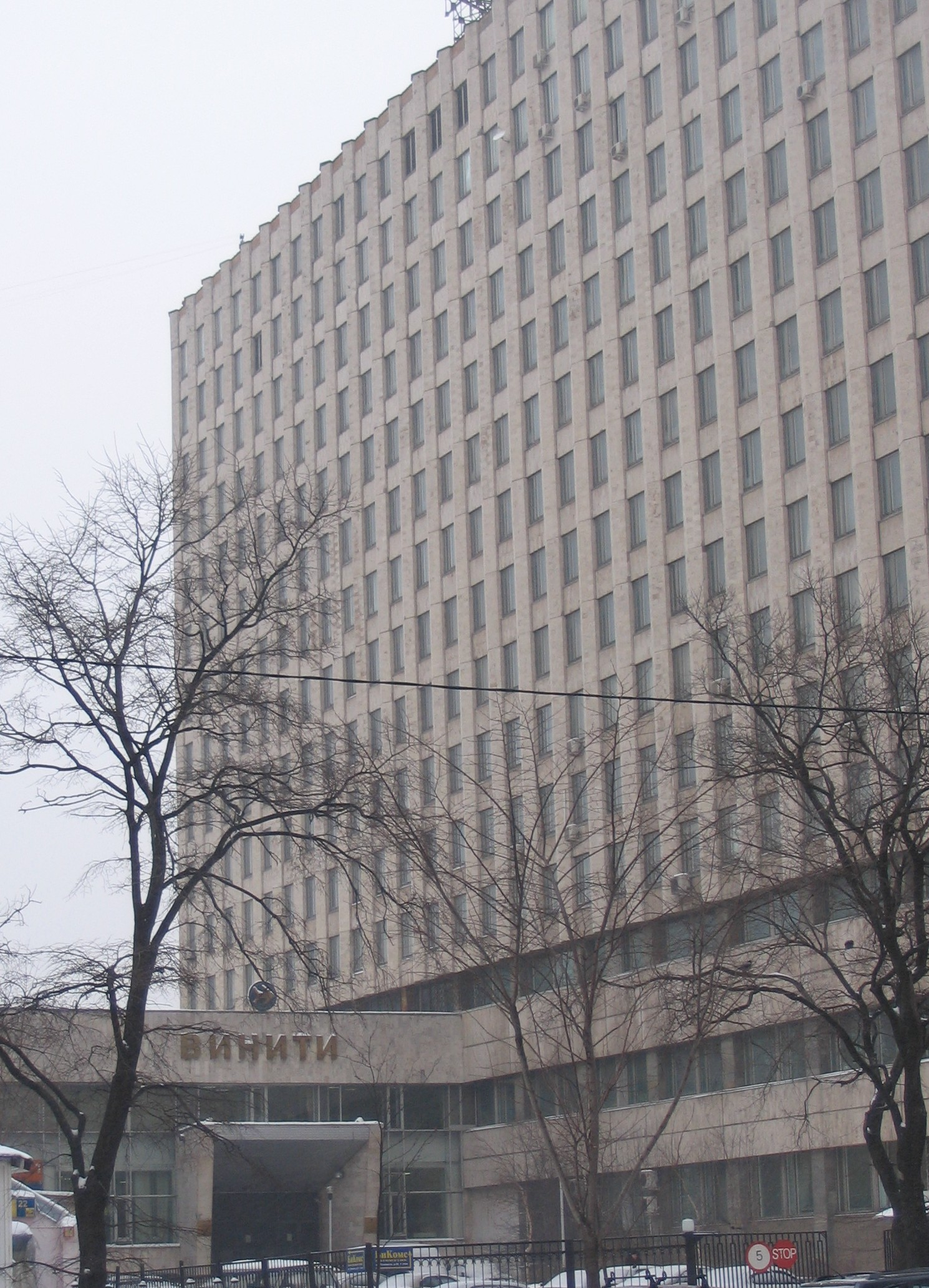 Здание ВИНИТИ. Фотография